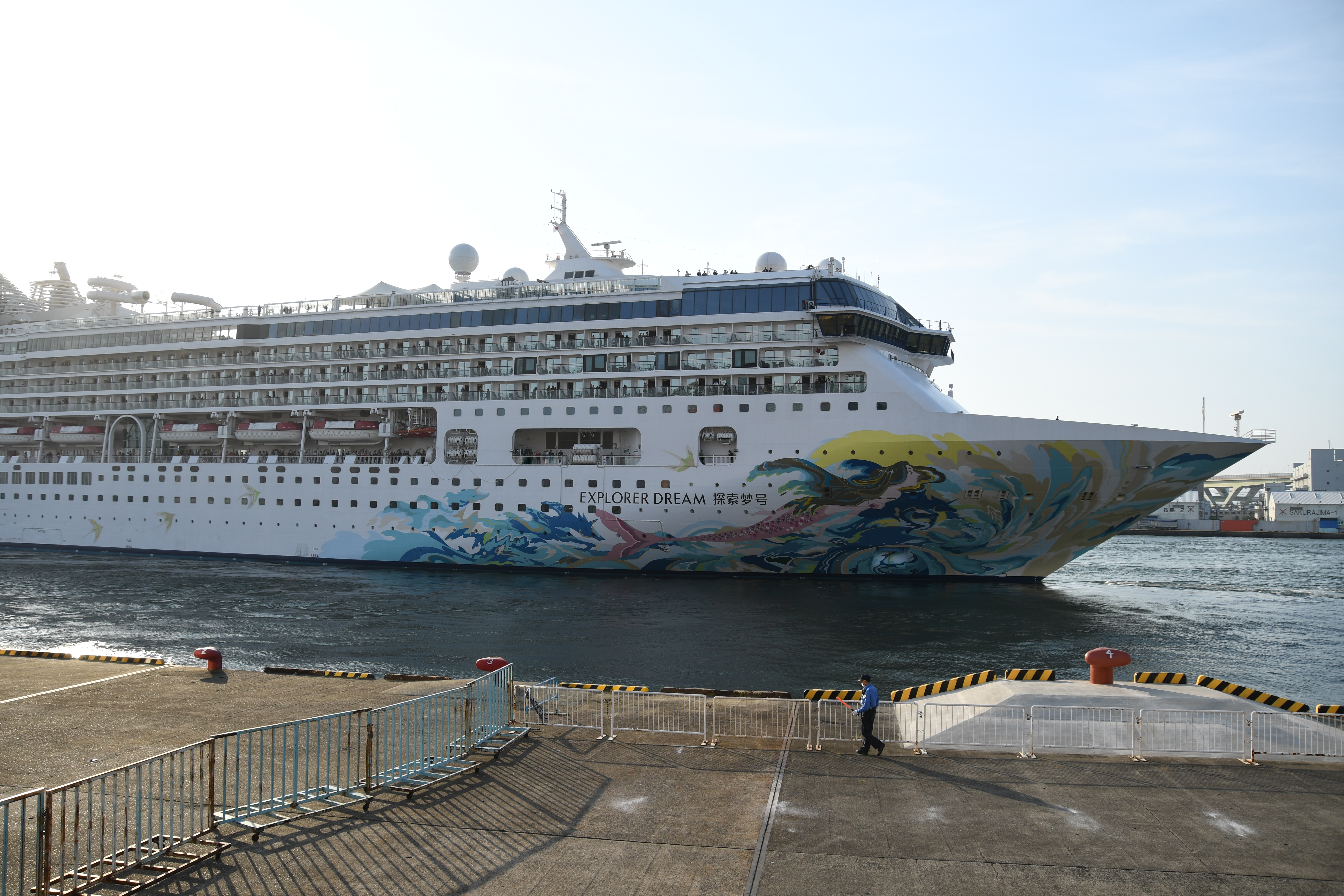 大阪築港・天保山大観覧車横から離岸するエクスプローラー・ドリーム